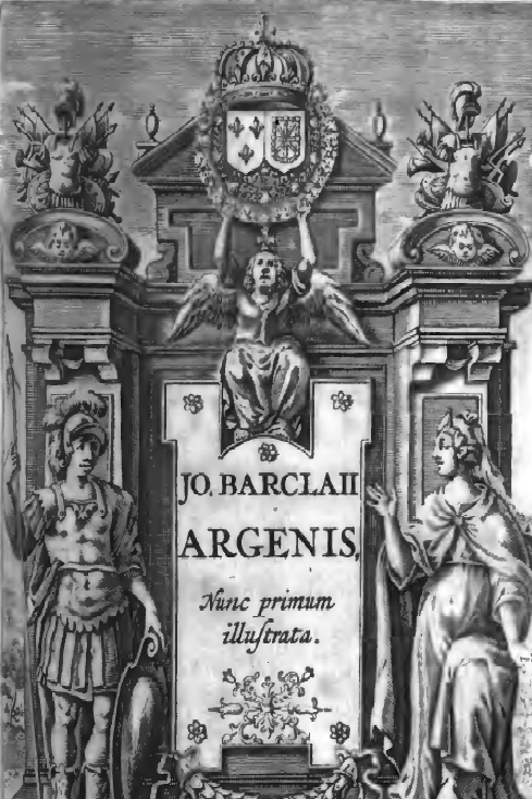 Титульный лист издания романа Дж. Беркли "Аргенида"